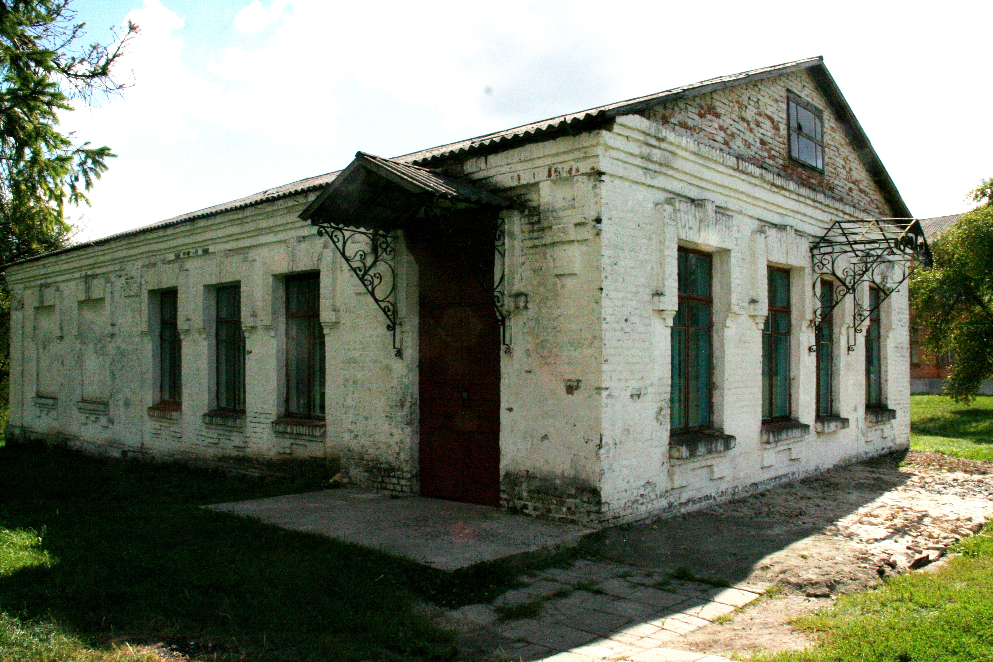 Будинок земської школи с.Баламутівка Ярмолинецького р-на